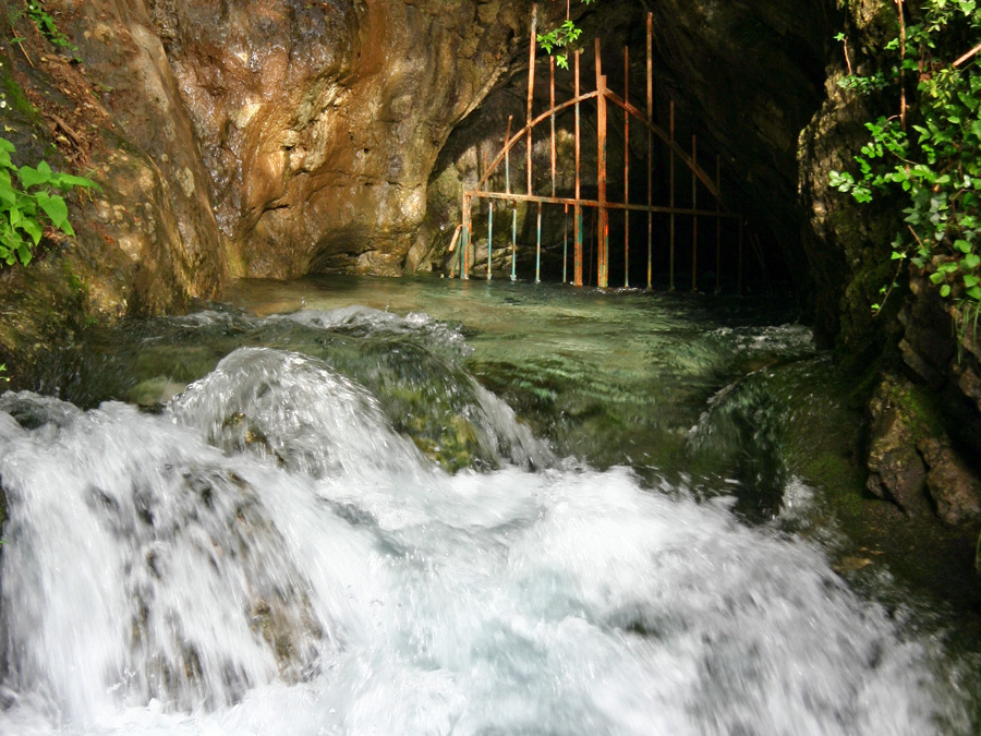 La grotta dove sgorga il torrente Fiumelatte